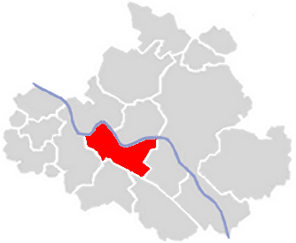 Altstadt, Dresden